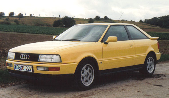 Audi Coupe in ginstergelb WOB-CL 227